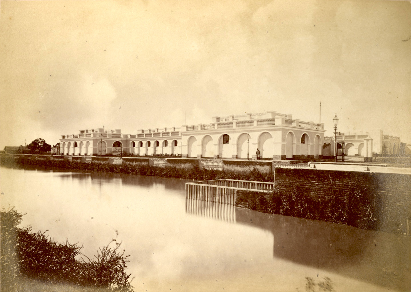 Gobernor of Buenos Aires Juan Manuel de Rosas' country house. It was built in 1838 in San Benito de Palermo (current Parque 3 de Febrero). At the front of the image can be seen the channel where the Sarmiento Avenue would be built years later.